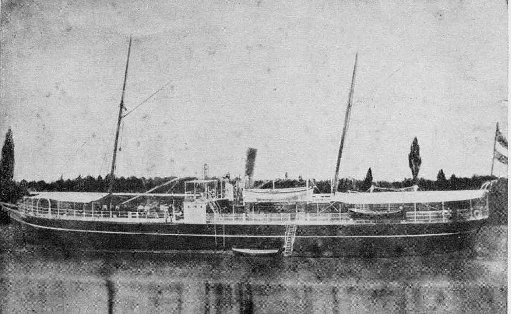 El vapor transporte de torpedos Vigilante antes de la explosión del 4 de octubre de 1877